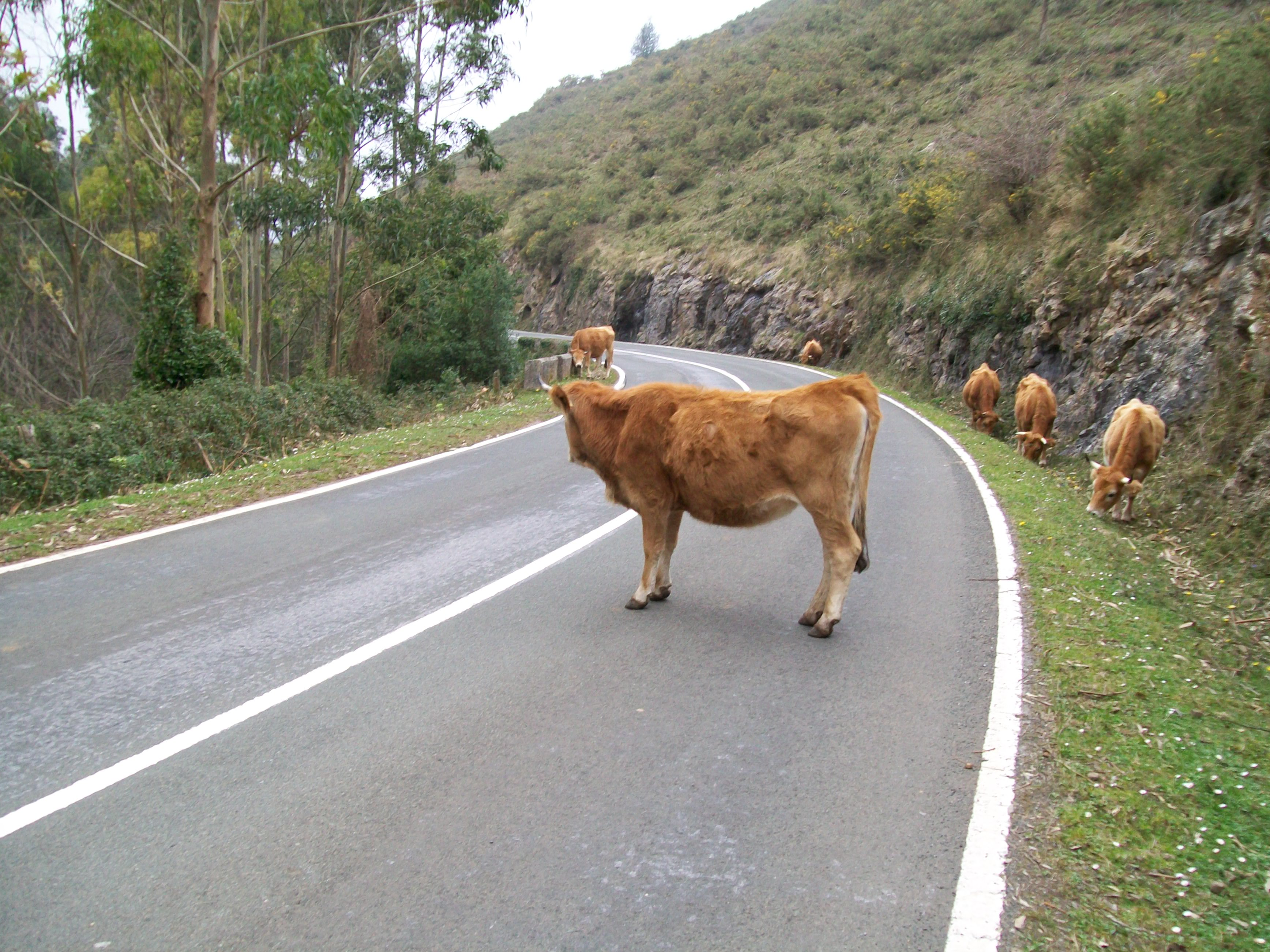 " La dueña de la carretera " AS- 260 Arriondas - Colunga